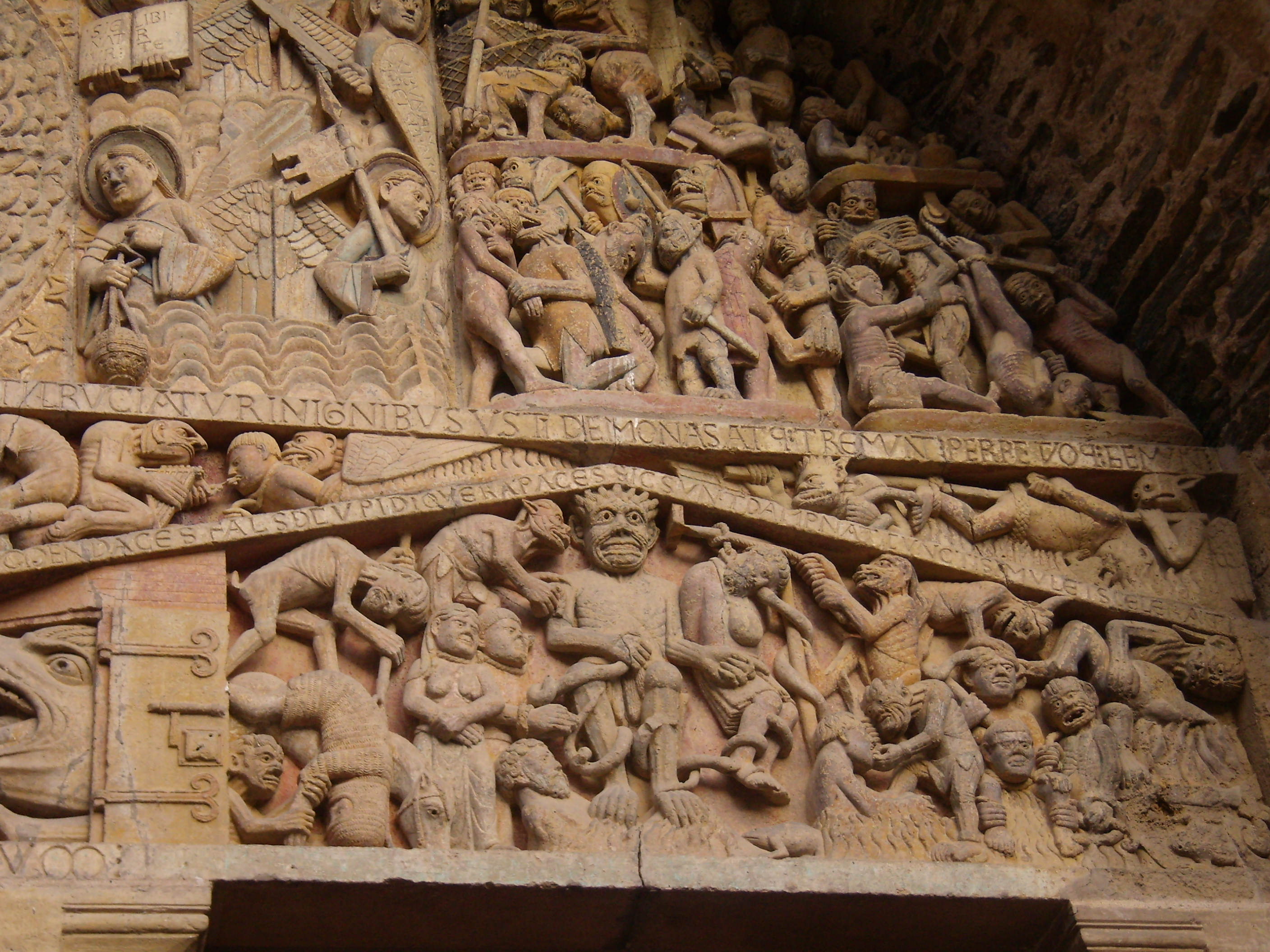 Particolare della lunetta del portale. Abbaziale di St. Foy, Conques, Francia